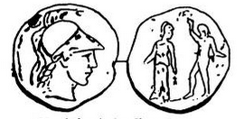 Athenische Münze der römischen Kaiserzeit mit Darstellung von Athena und Marsyas